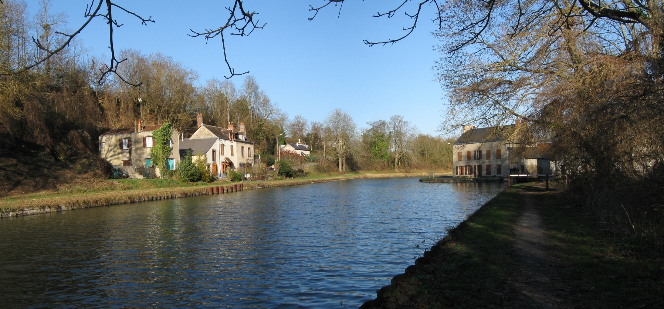 Le canal du Loing à Cepoy, au sud-ouest de la localité. Vue vers le nord.